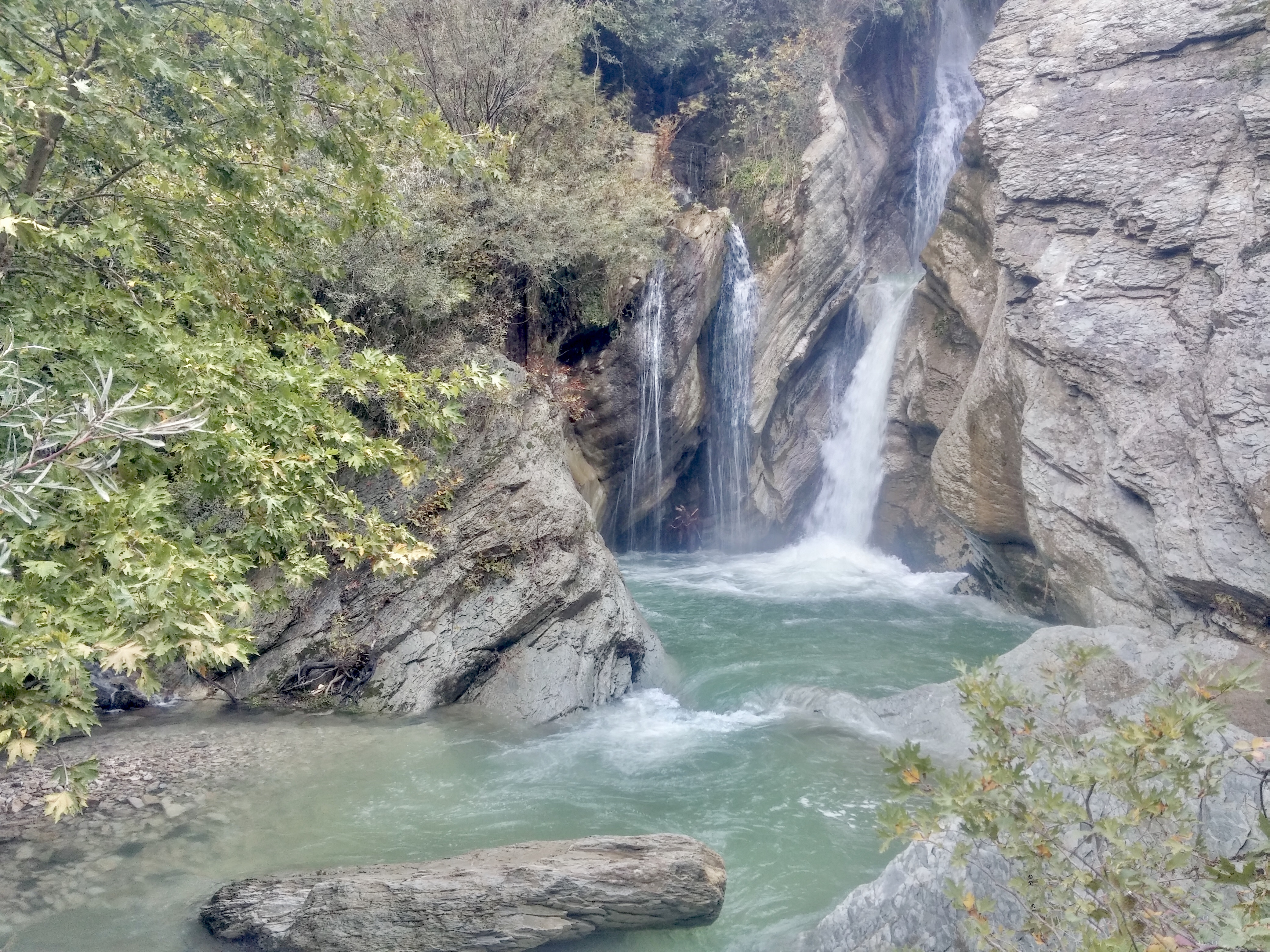 Bogove, Skrapar